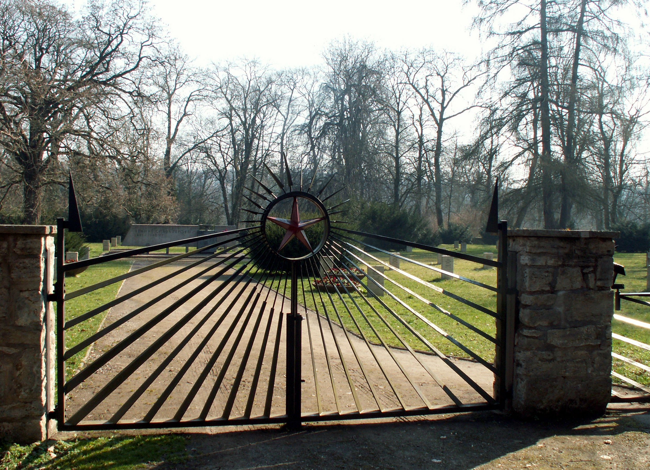 Sowjetischer Friedhof im Ilmpark in Weimar (ursprüngliches Bild auf noch mit ShiftN perspektivisch korrigiert sowie Farbe korrigiert)